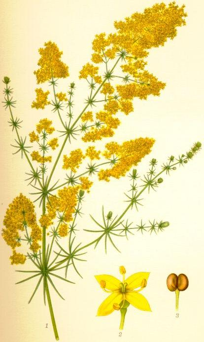 Gulmåra (Galium verum) stjälktopp med blomställning, blomma (10/1), klyvfrukt (5/1)